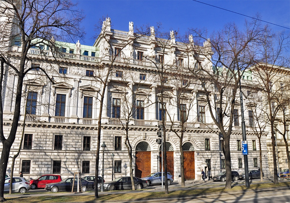 Palais Erzherzog Wilhelm, Wien